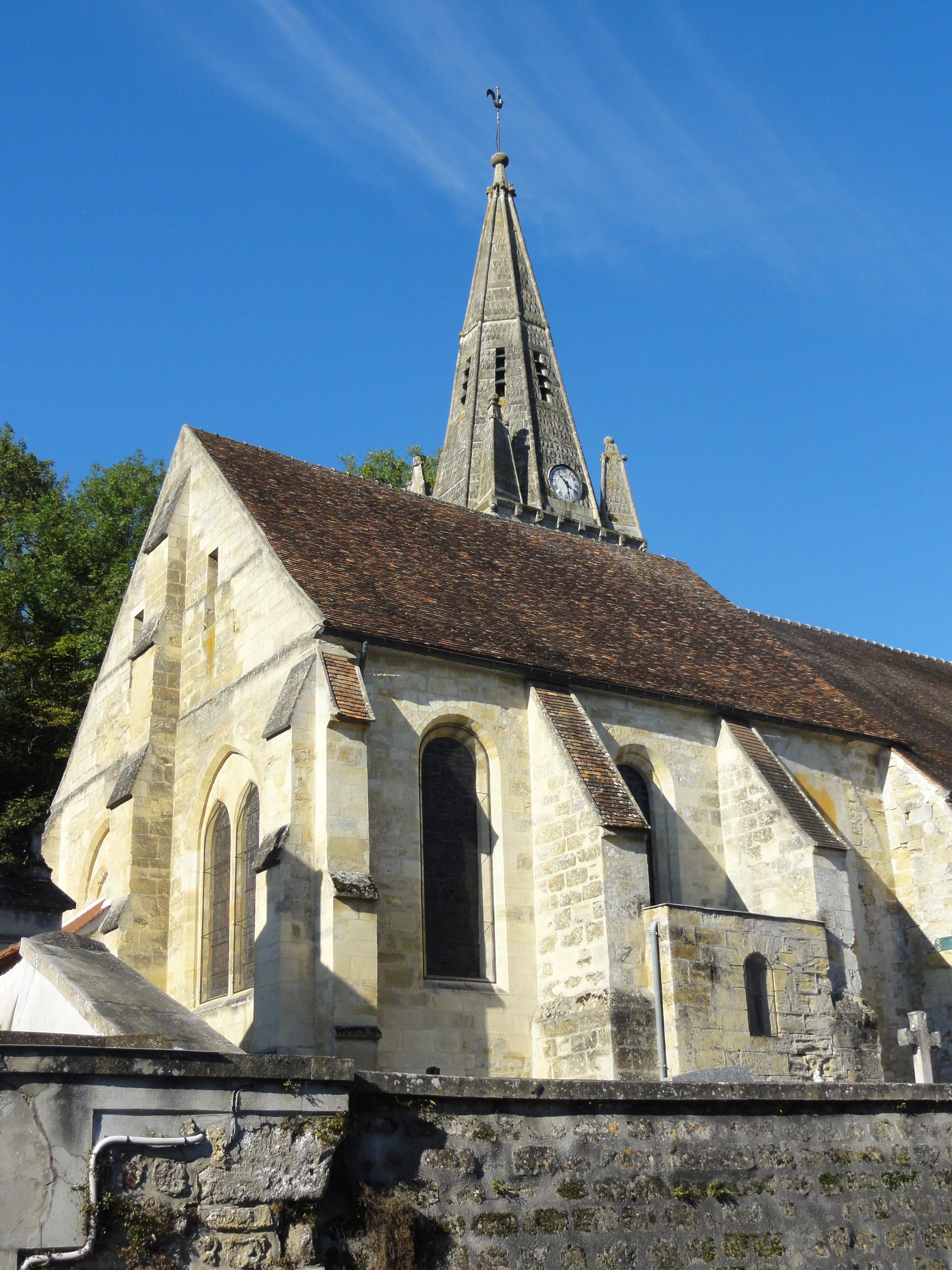 Église Saint-Lucien de Courcelles-sur-Viosne.